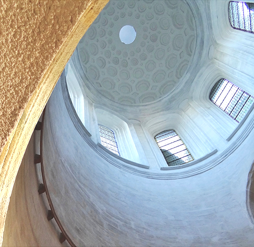 édifice restauré en 2009.